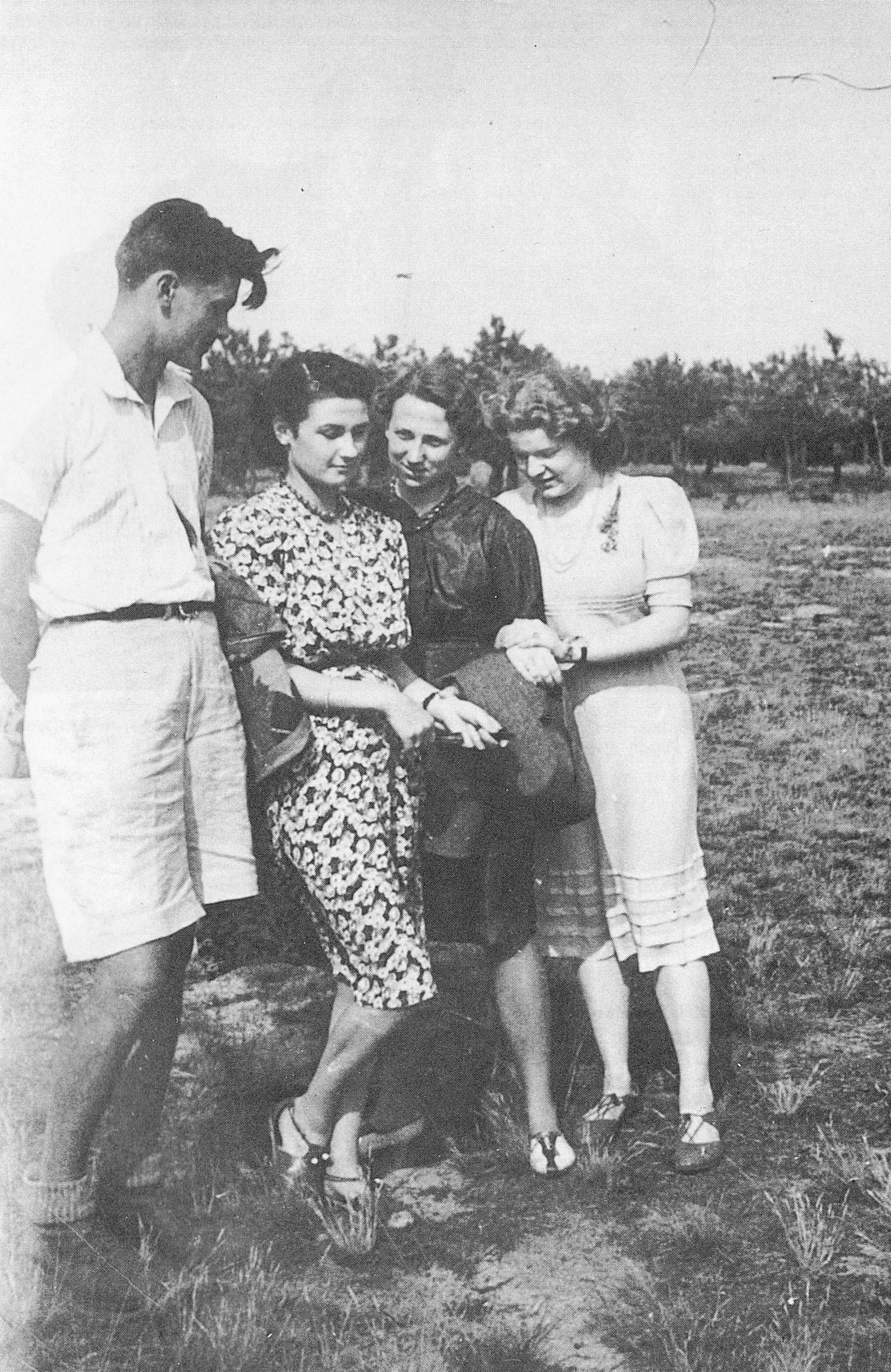 Maciej Aleksy Dawidowski, Barbara Sapińska, Danuta Zdanowiczówna i Anna Pyrzykowska